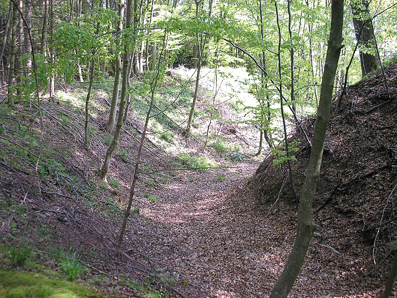 Hochmittelalterlicher Burgstall Hattenberg bei Ried (Markt Dinkelscherben, Landkreis Augsburg, Bayerisch-Schwaben). Blick in den Ringgraben der Hauptburg. Eigene Aufnahme, Mai 2008 / High Middle Ages Hattenberg castle near Ried (Dinkelscherben, Landkreis Augsburg, Bavaria, Germany). View into the moat of the central castle. Own photo, May 2008